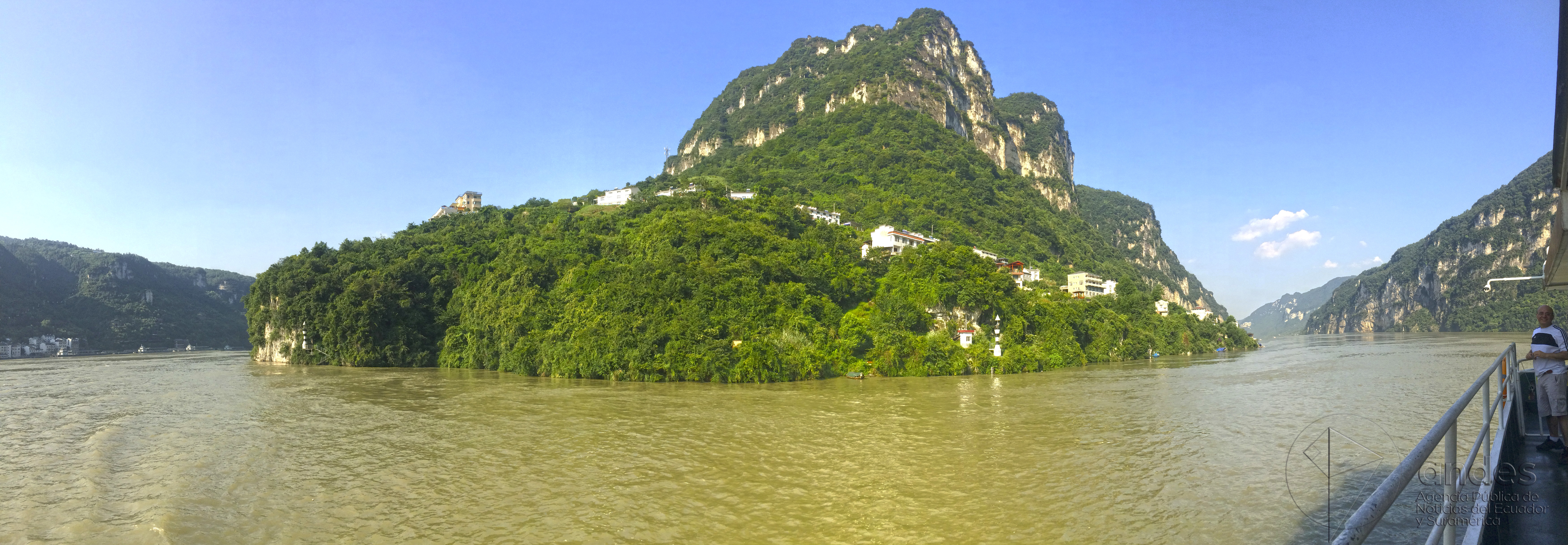 Beijing, 31 julio 2017 (Andes).- Ataúdes colgando de la montaña, un riachuelo azul en medio de la selva, monos salvajes, rituales ancestrales para recibir a los barcos, entre otras cosas, son parte de los atractivos turísticos de la Tribu de las Tres Gargantas, un área natural a las orillas del río Yangtzé, en el sureste de China. Por su riqueza natural el sector ha sido catalogado como un “Centro de Protección de la Cultura Popular y Arte de las Tres Gargantas” y se ha convertido en uno de los cinco principales atractivos de la ciudad de Yichang, en la provincia de Hubei, y cada año recibe a miles de turistas, principalmente del interior del país. ANDES/Lizette Abril. This file comes from the Flickr stream of the Public News Agency of Ecuador and South America and is copyrighted. This file is verified as being licenced under an appropriate Creative Commons licence. In short: you are free to modify the file as long as you attribute Photographer name/Andes and distribute it under the same licence. This tag does not indicate the copyright status of the attached work. A normal copyright tag is still required. See Commons:Licensing for more information. English | español | +/−